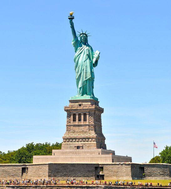 Estatua de la libertad.